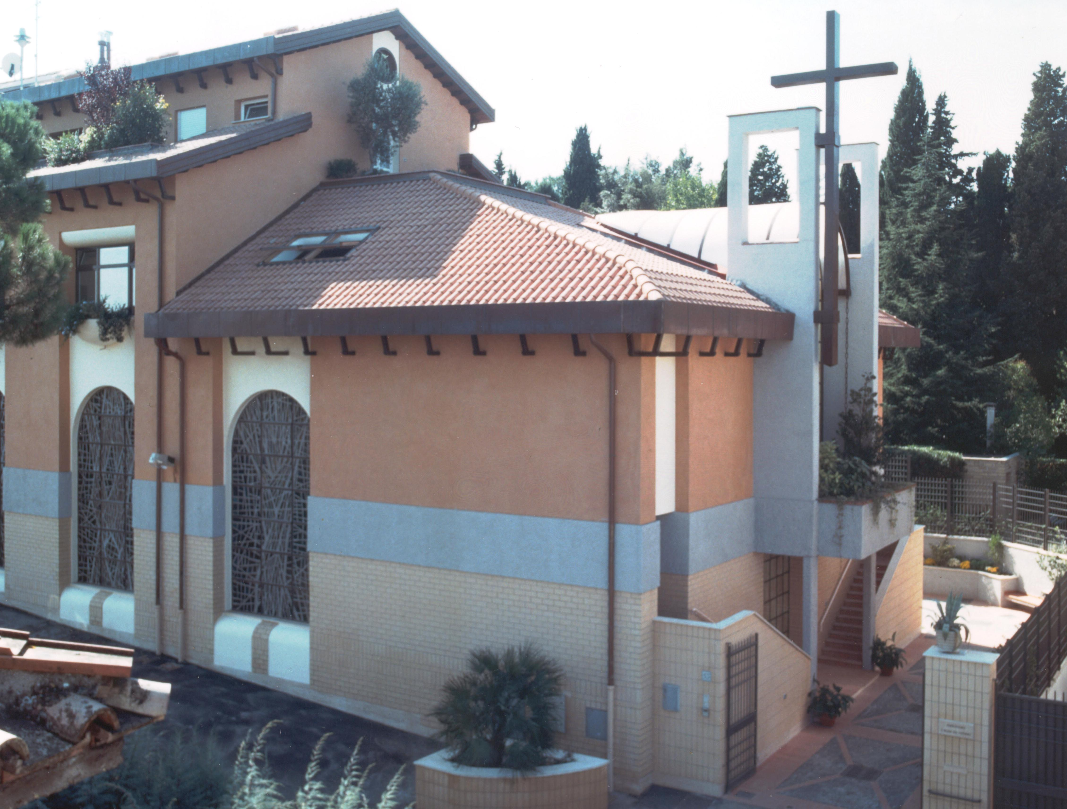 Chiesa di Santa Rosa da Viterbo, a Roma, nel suburbio Tor di Quinto, in via Santa Giovanna Elisabetta.